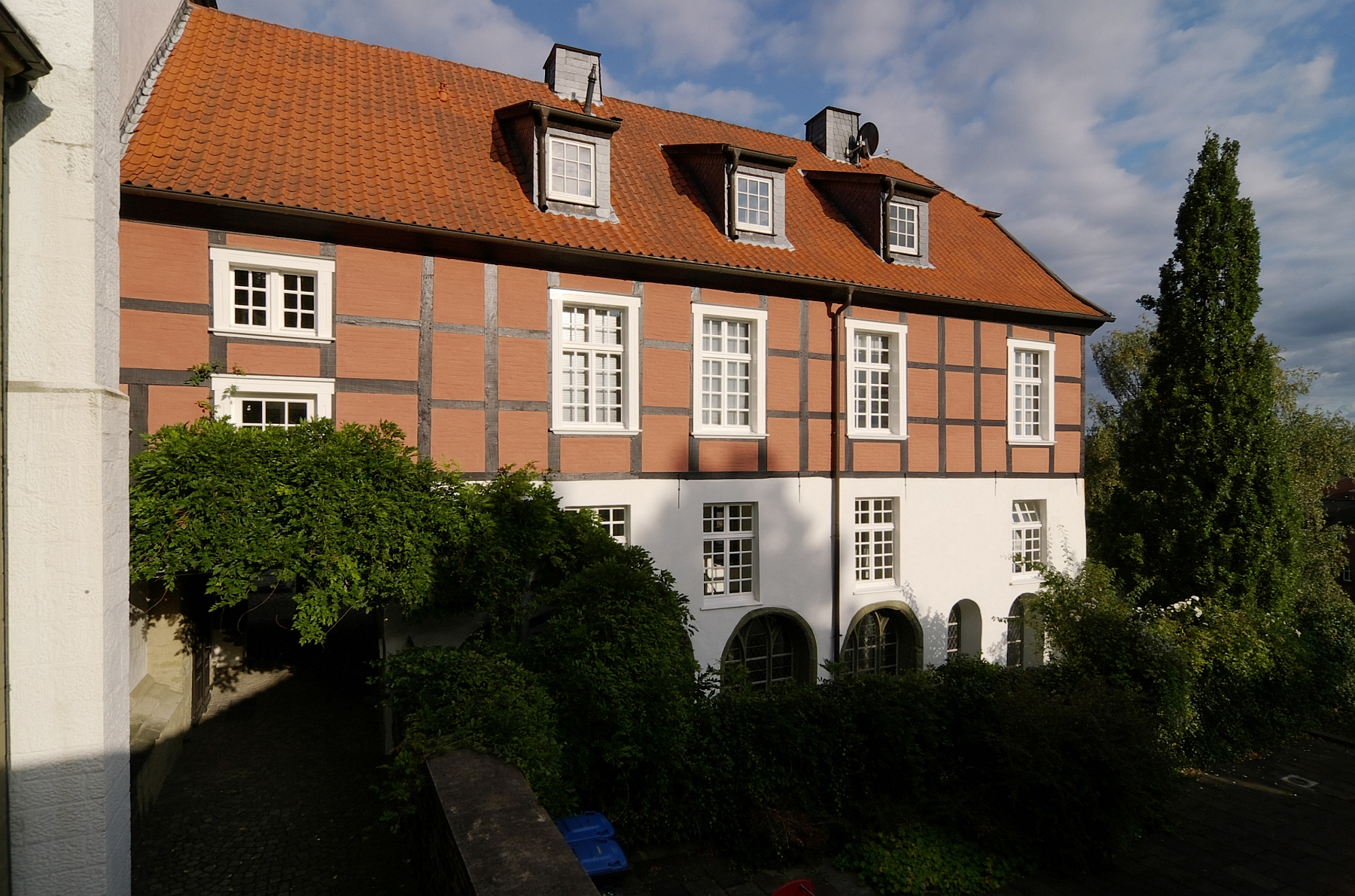 Fröndenberg an der Ruhr, Nordrhein-Westfalen, an der Stiftskirche